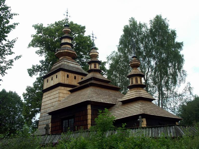 Cerkiew w Kotani (powiat jasielski)